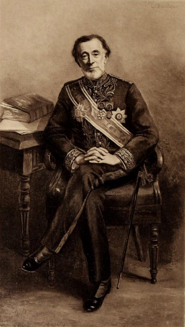 Portrait de Louis de Bussy, membre de l'Institut, Inspecteur général du génie maritime, portant le cordon de Grand officier de l'Ordre national de la Légion d'honneur qui lui a été remis le 26 décembre 1888.